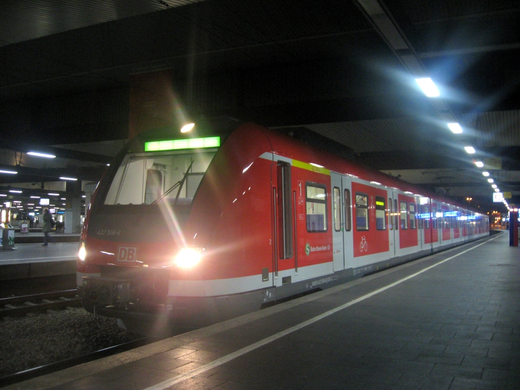 422 006 steht am Abend des 07.10.2008 in Düsseldorf Hbf